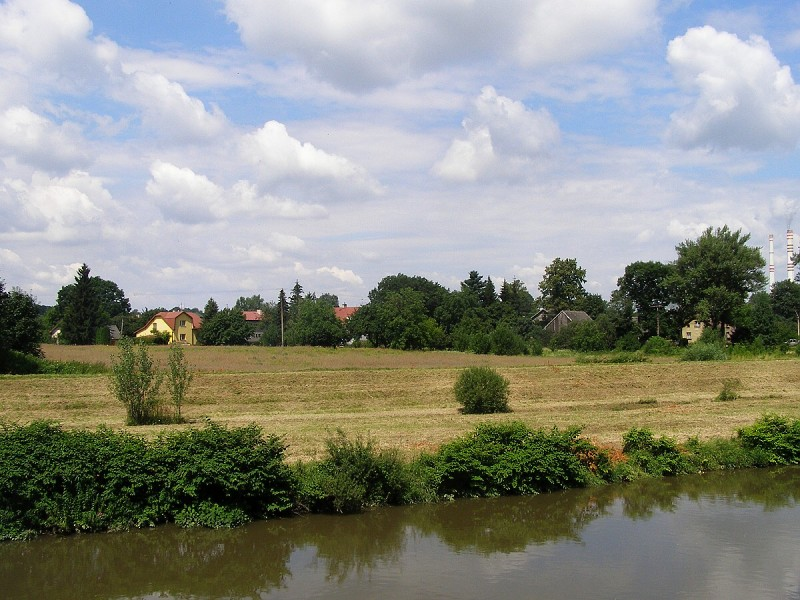 Osada Koukolná a údolní niva řeky Olše